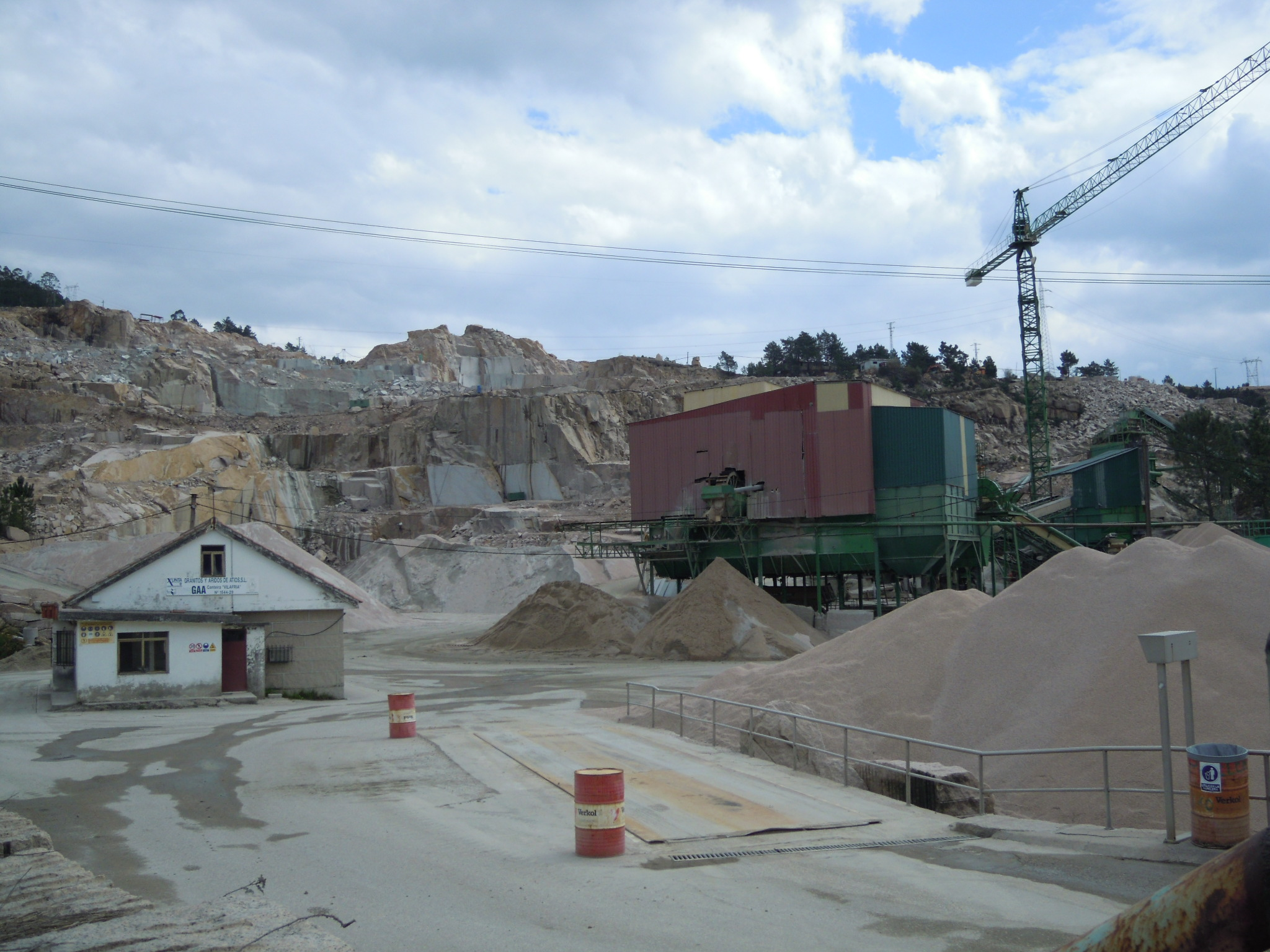 Canteira de granito Rosa Porriño en Atios (O Porriño).